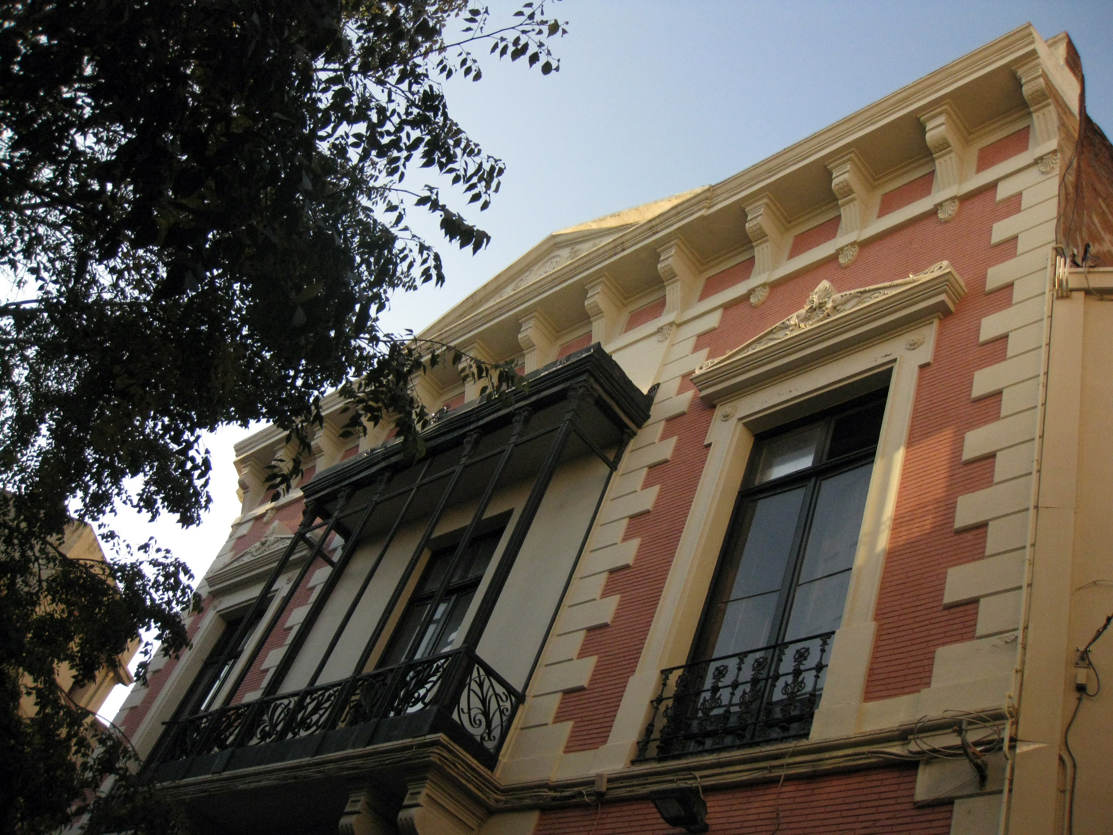 Edifici de la Unió Comercial i Industrial, antic magatzem Cortès i Colomer, a la placeta de la Font Trobada núm. 2, cantonada amb el raval de Montserrat núm. 4 (Terrassa). Edifici de Joan Carpinell del 1898.